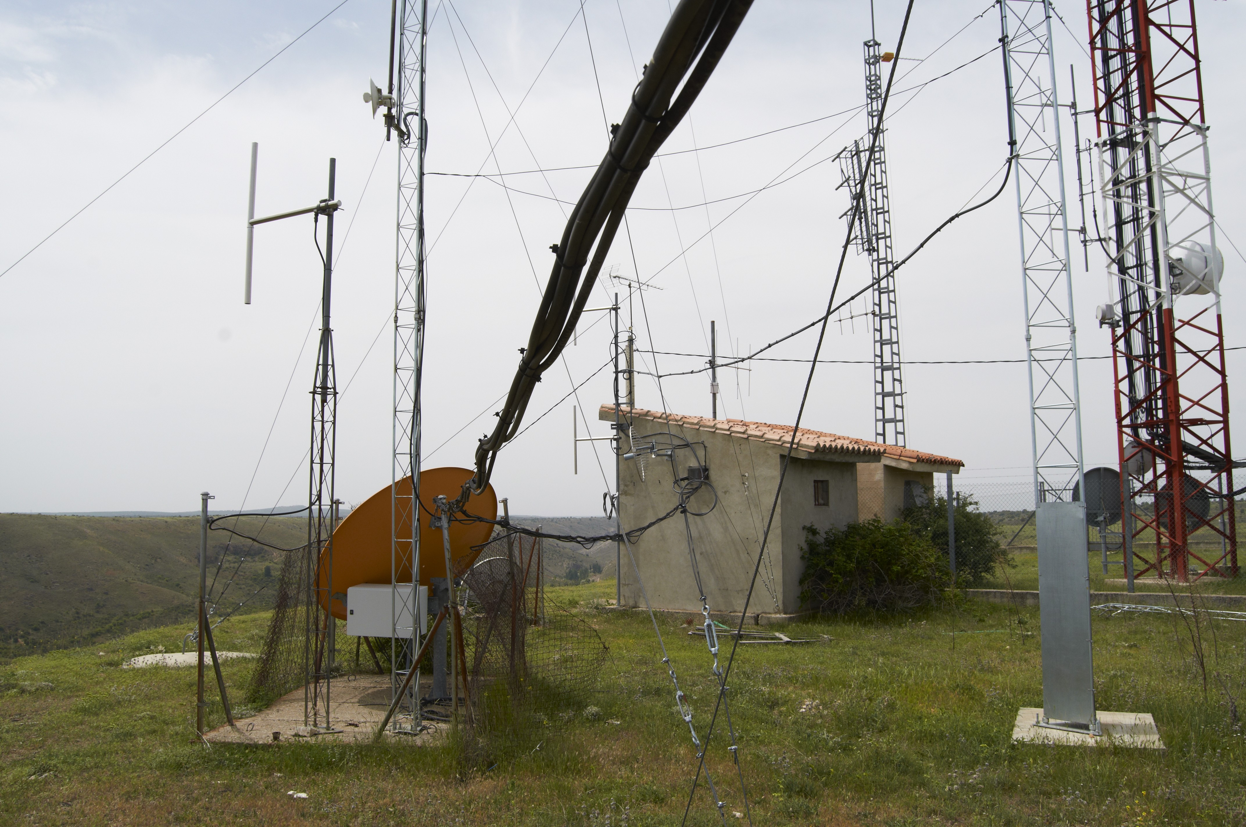 Repetidor TV